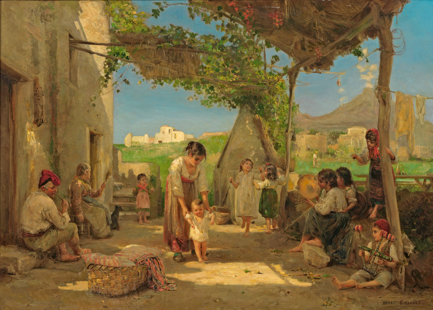 Neapolitanische Genreszene, spielende Kinder mit ihren Großeltern